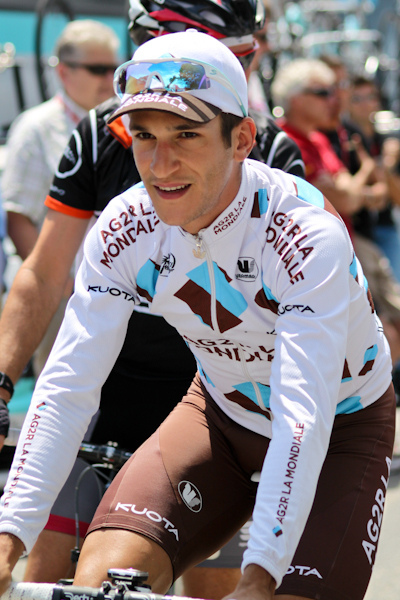 Etape 1 (Albertville) du Critérium du Dauphiné 2011